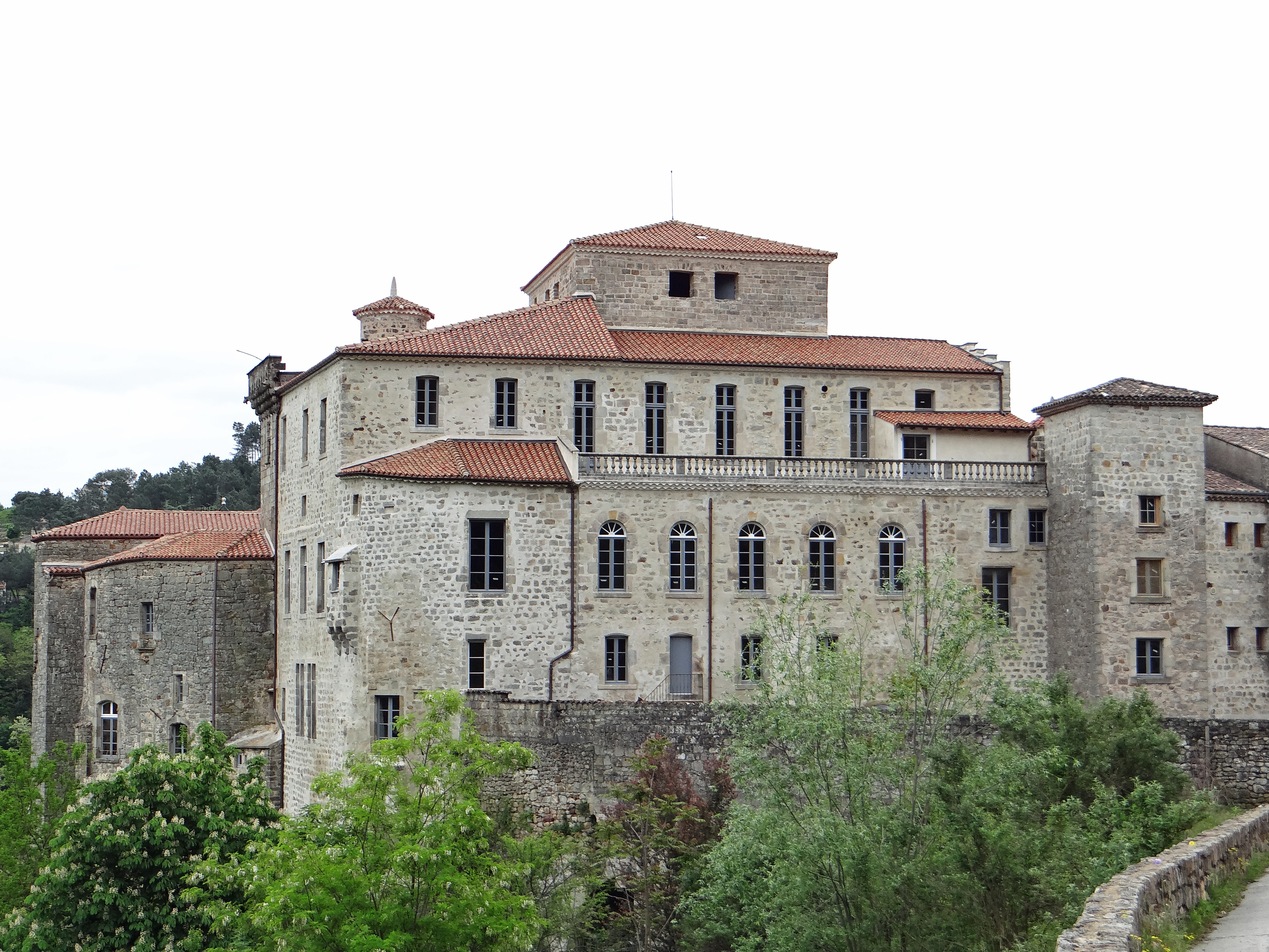 Château de Largentière vu depuis la route de Tauriers